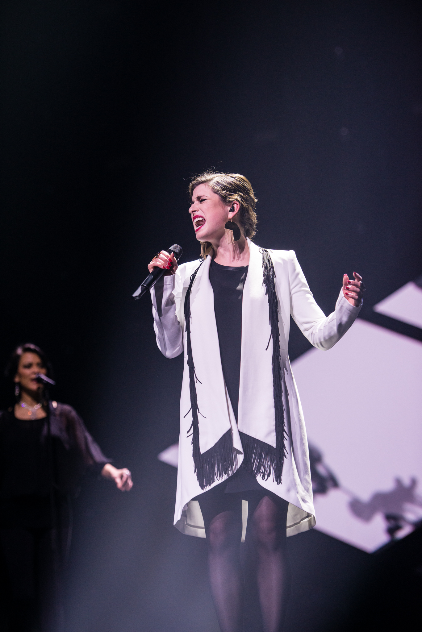 'Eurovision Song Contest 2015 - Unser Song für Österreich': 'Ann Sophie'